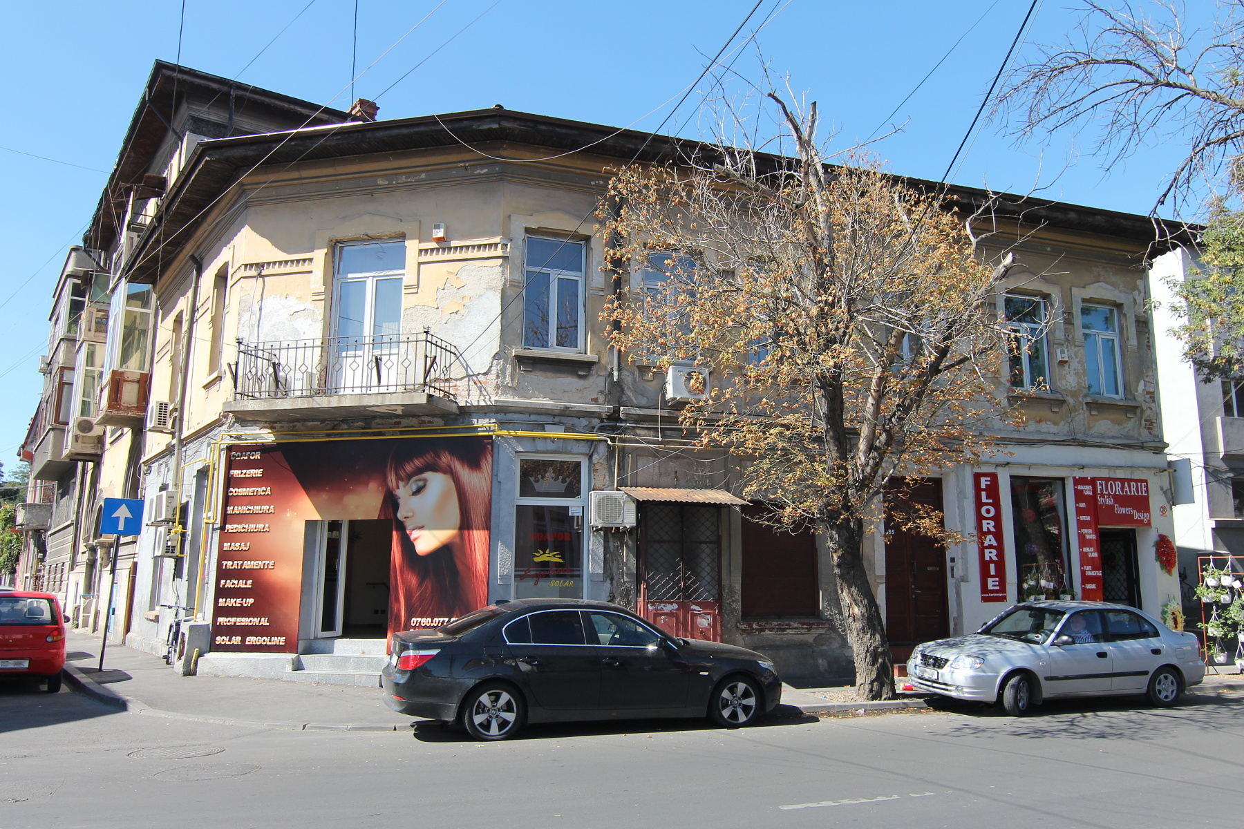 Casă pe strada Traian